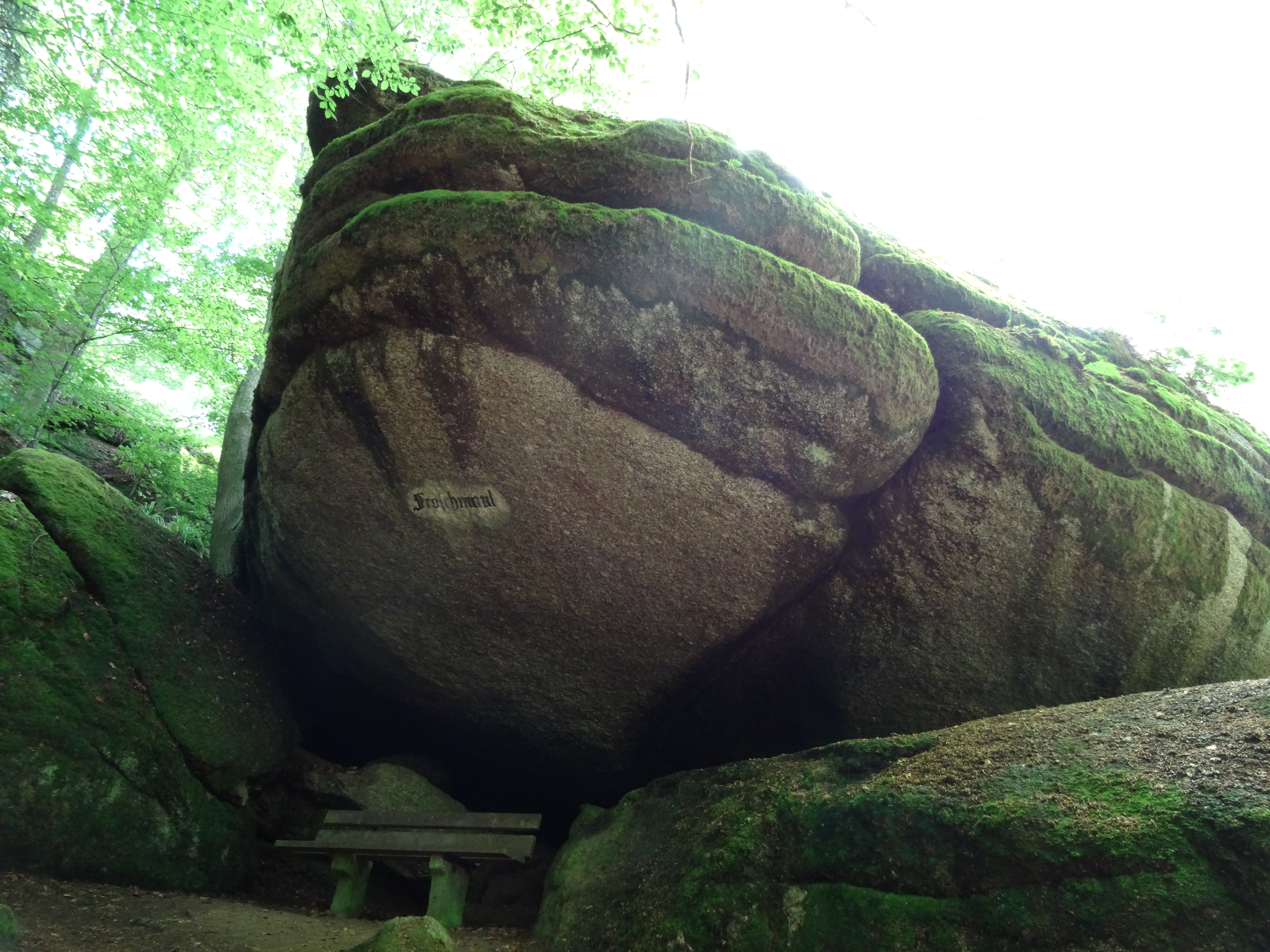 Felsformation Froschmaul im Naturpark Burg Falkenstein